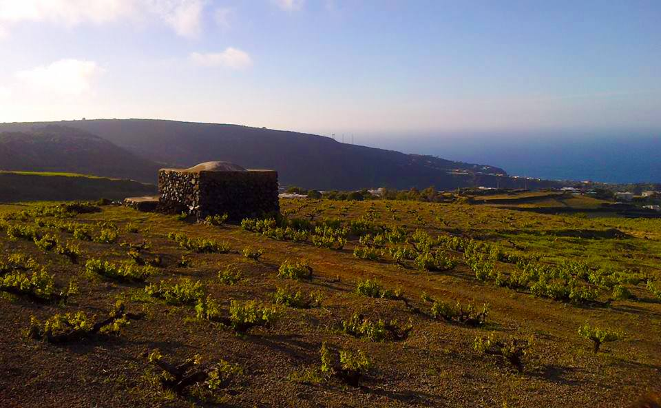 Dammuso di pantelleria